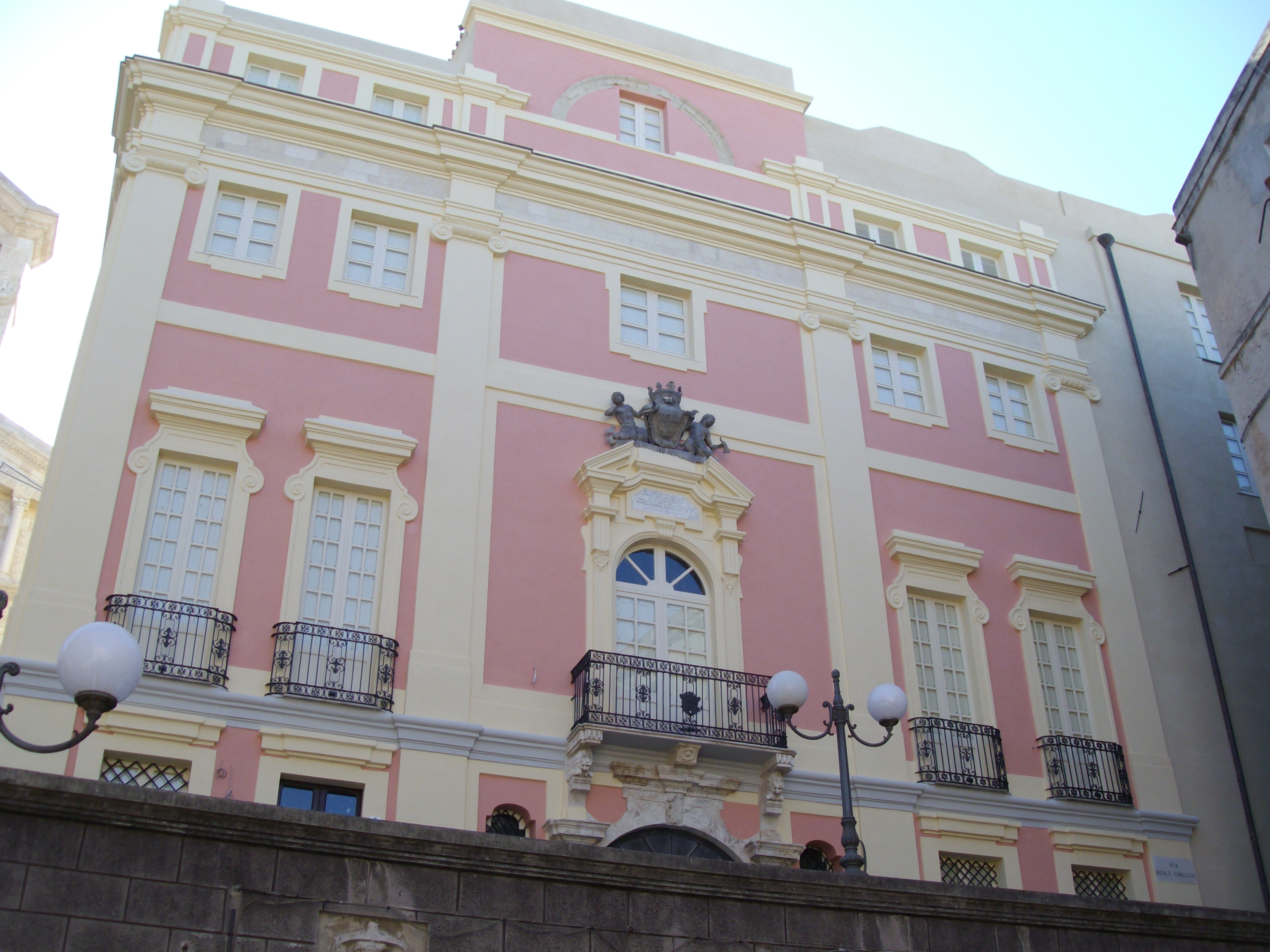 Ex Palazzo di Città (XVIII secolo), a Cagliari